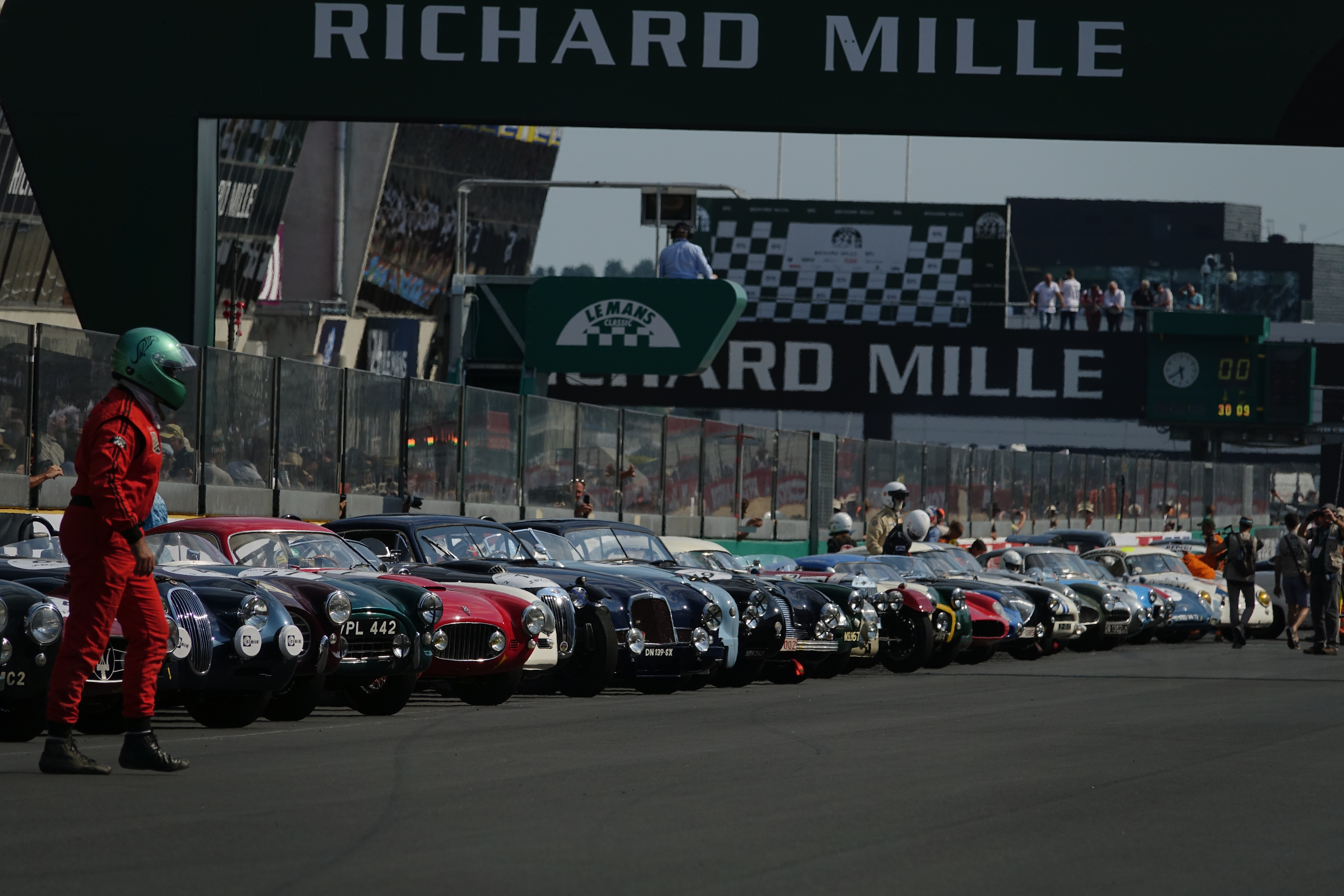 Le Mans Classic 2018